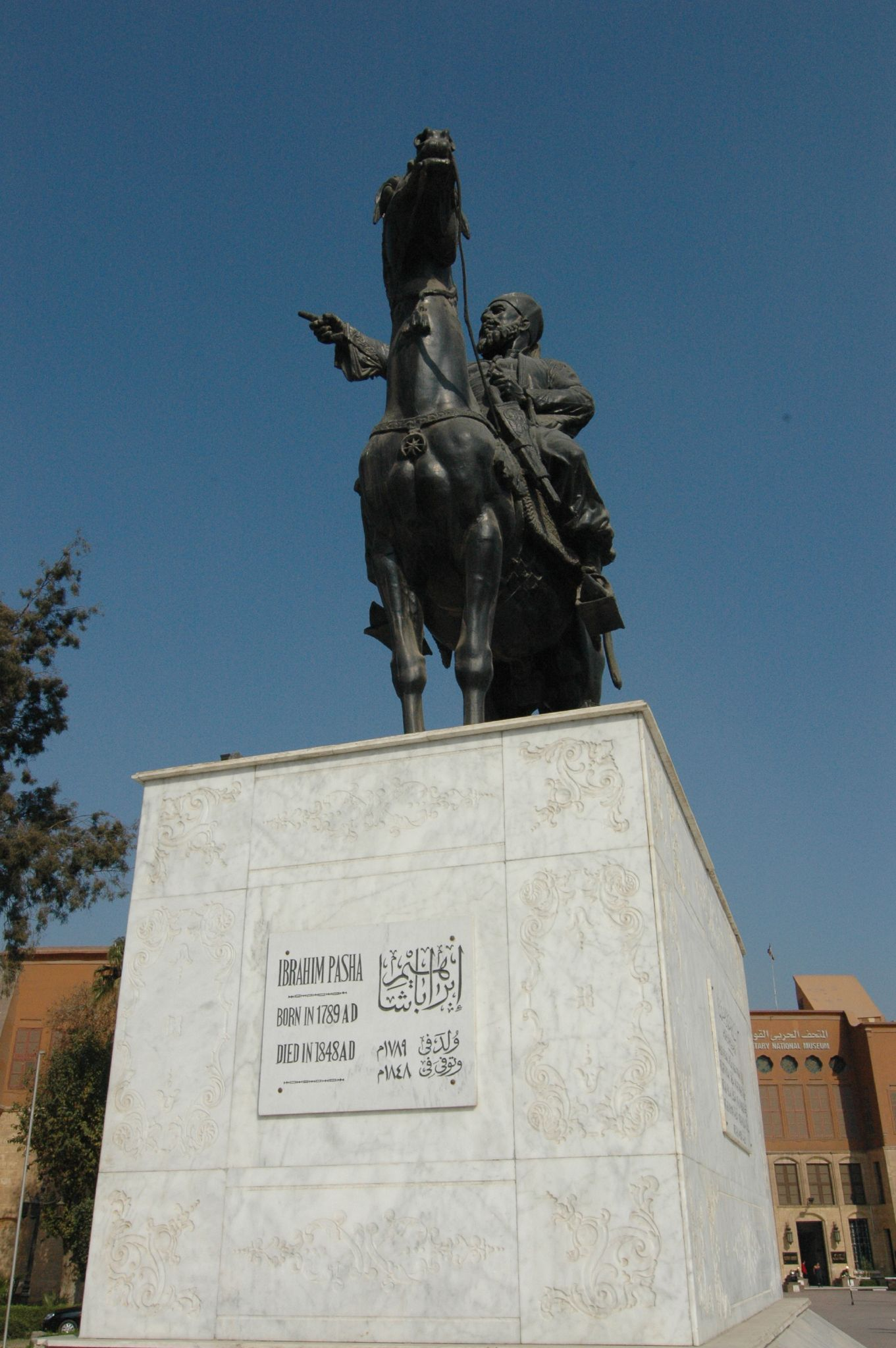 Cairo: museo militare